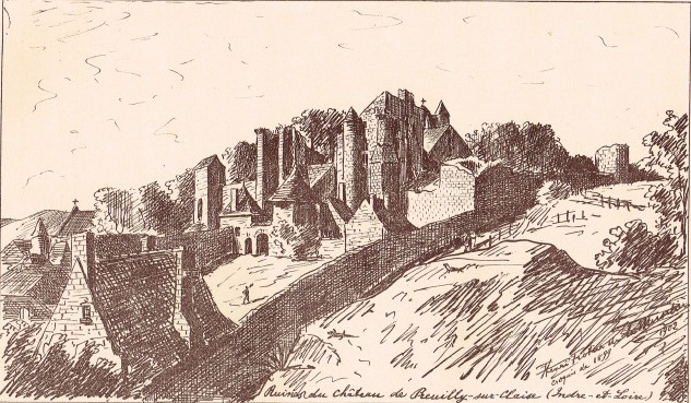 Fiefs de Pierre Frotier (Dessin d' Henri Frotier de La Messelière- 1902).